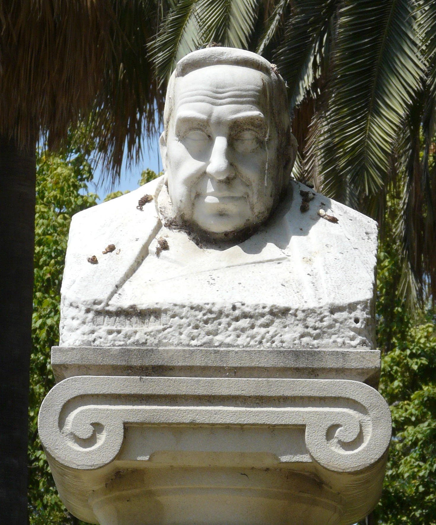 Bust de Roc Chabàs als jardins de Vivers